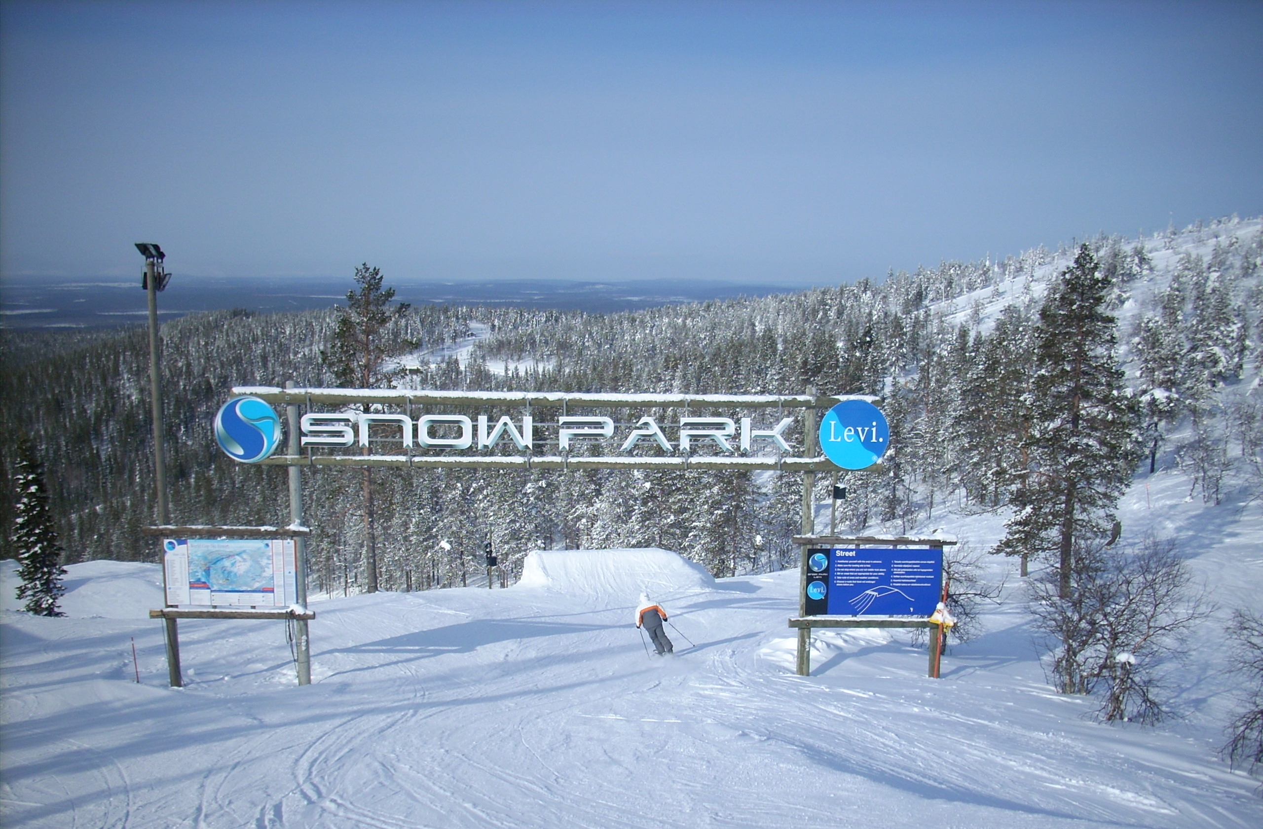 Kuva Levin Snow Parkista.